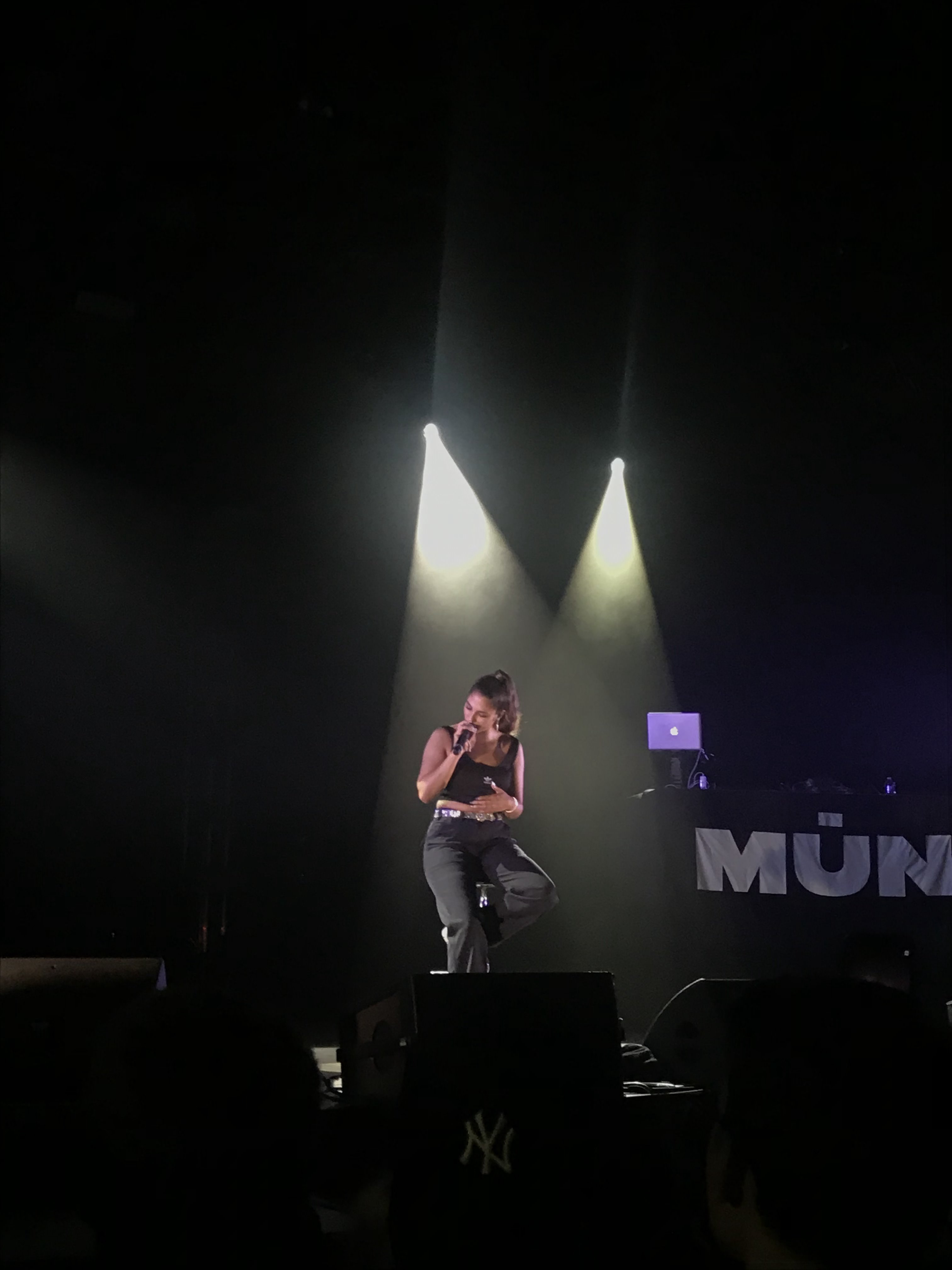 Chilla, chanteuse de rap le Vendredi 18 octobre 2019 à Holocène, Alpexpo, Grenoble (38).